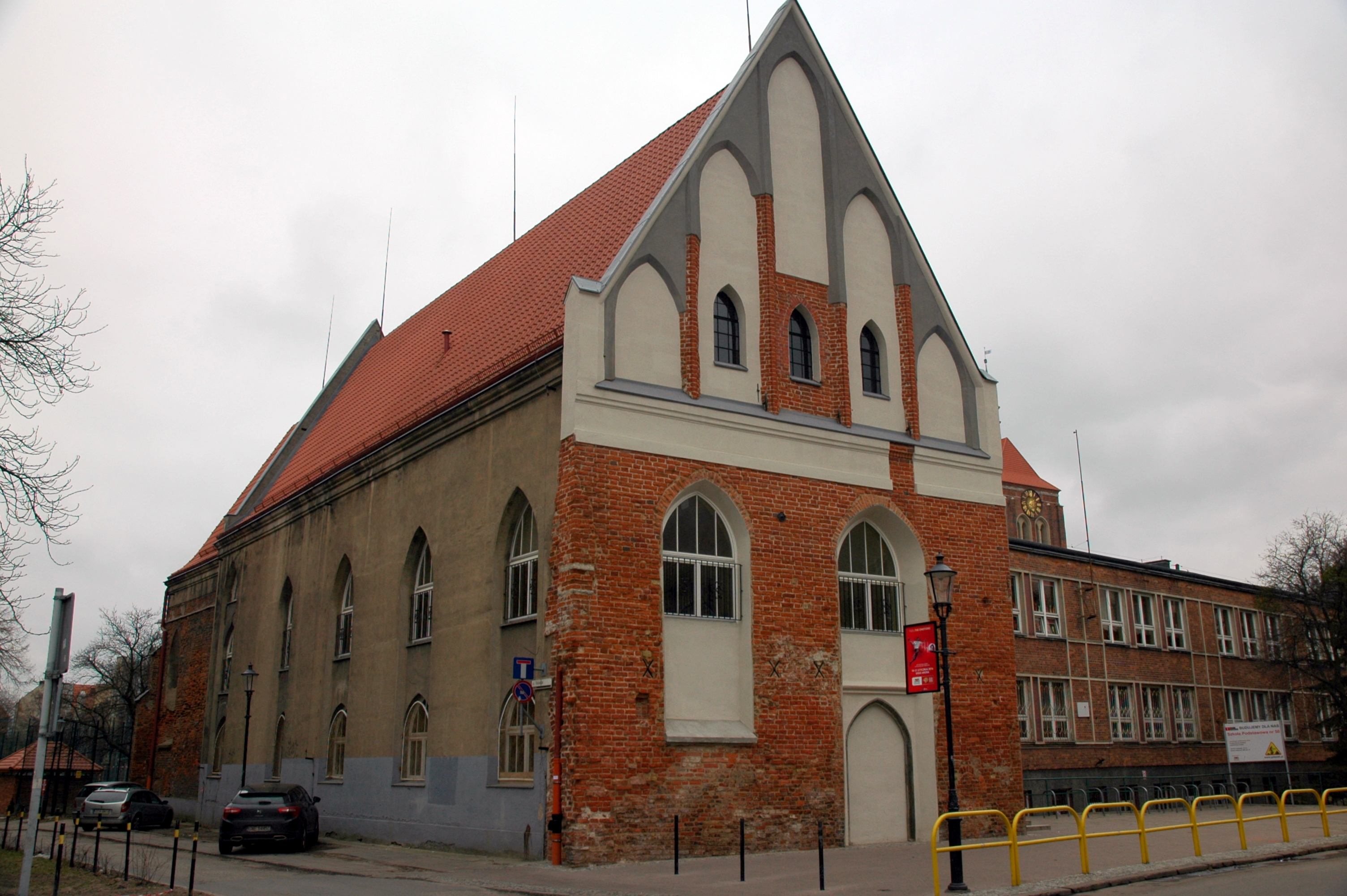 Gdańsk Główne Miasto, ul. U furty / ul. Św. Tobiasza - kościół św. Ducha (prezbiterium i fasada kościoła szpitalnego), obecnie sala gimnastyczna SP 50, 1357, XVII w zespole szpitala Ducha Świętego